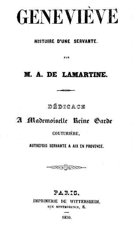 Page de titre de "Geneviève, histoire d'une servante", avec la dédicace par Alphonse de Lamartine à la goguettière aixoise Reine Garde.